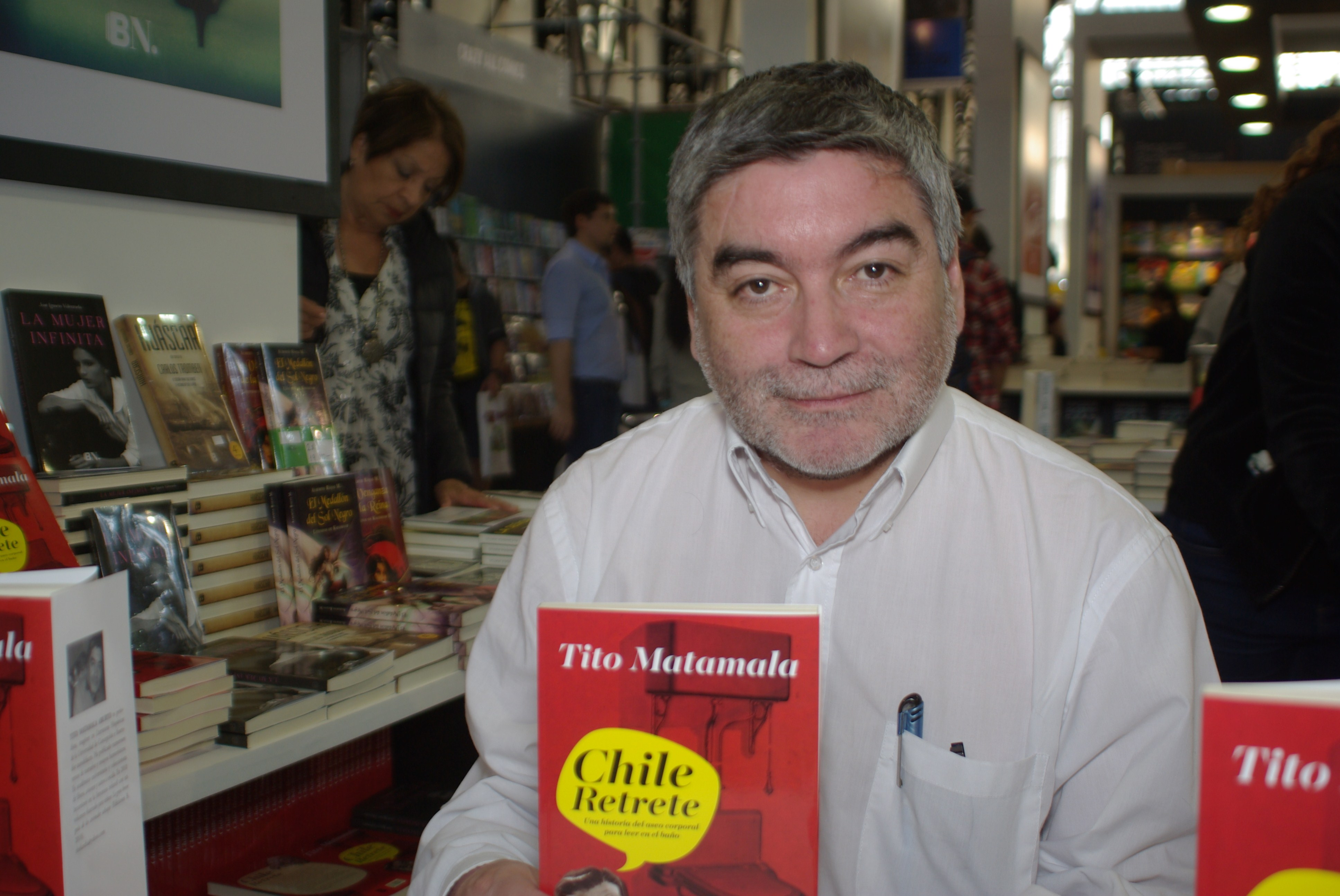 El escritor chileno Tito Matamala en la Feria Internacional del Libro de Santiago 2015